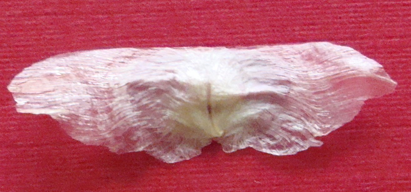 Nasiono (niedojrzałe)milinu Campsis radicans